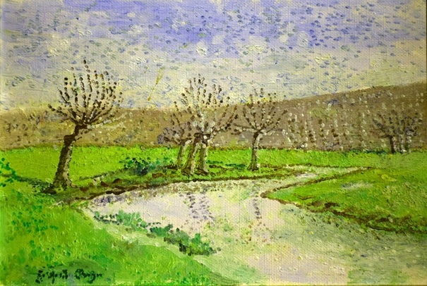 Fluss mit Kopfweiden (Beyer)